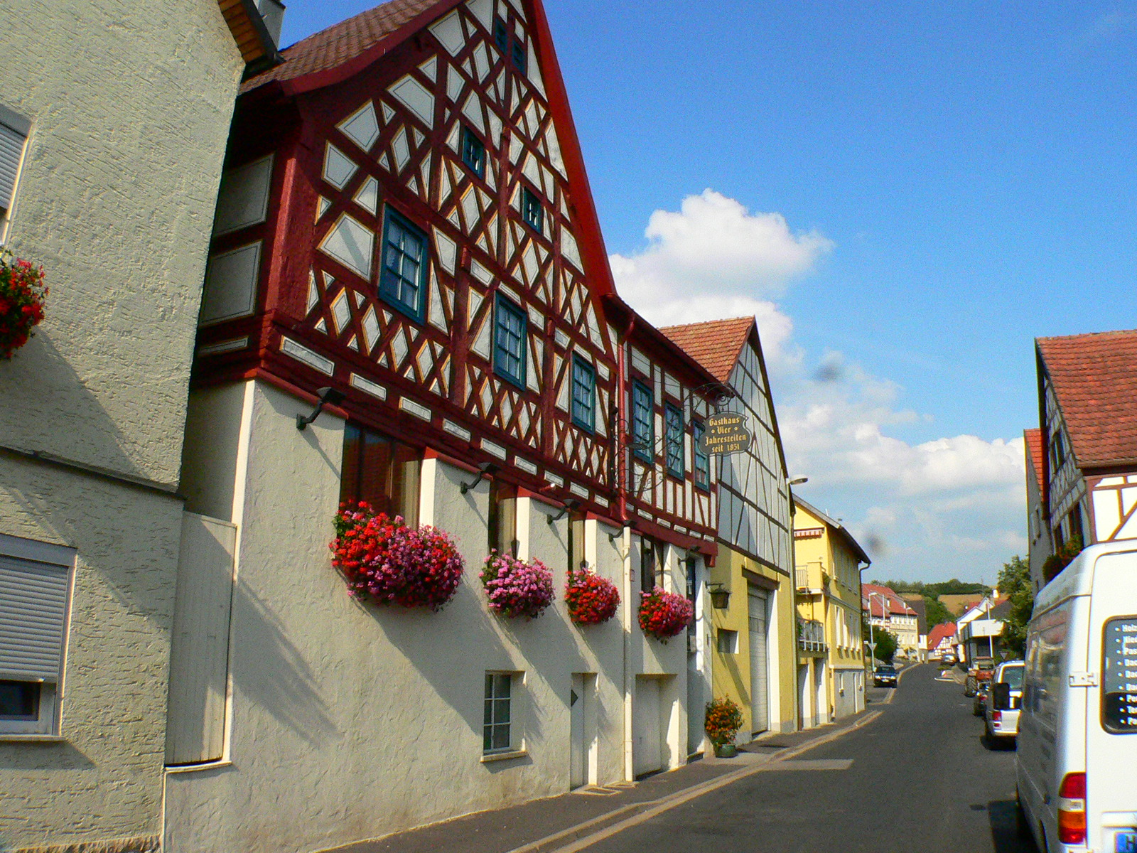 Hauptstraße in Schonungen, Ortsteil Forst, Germany, Bavaria